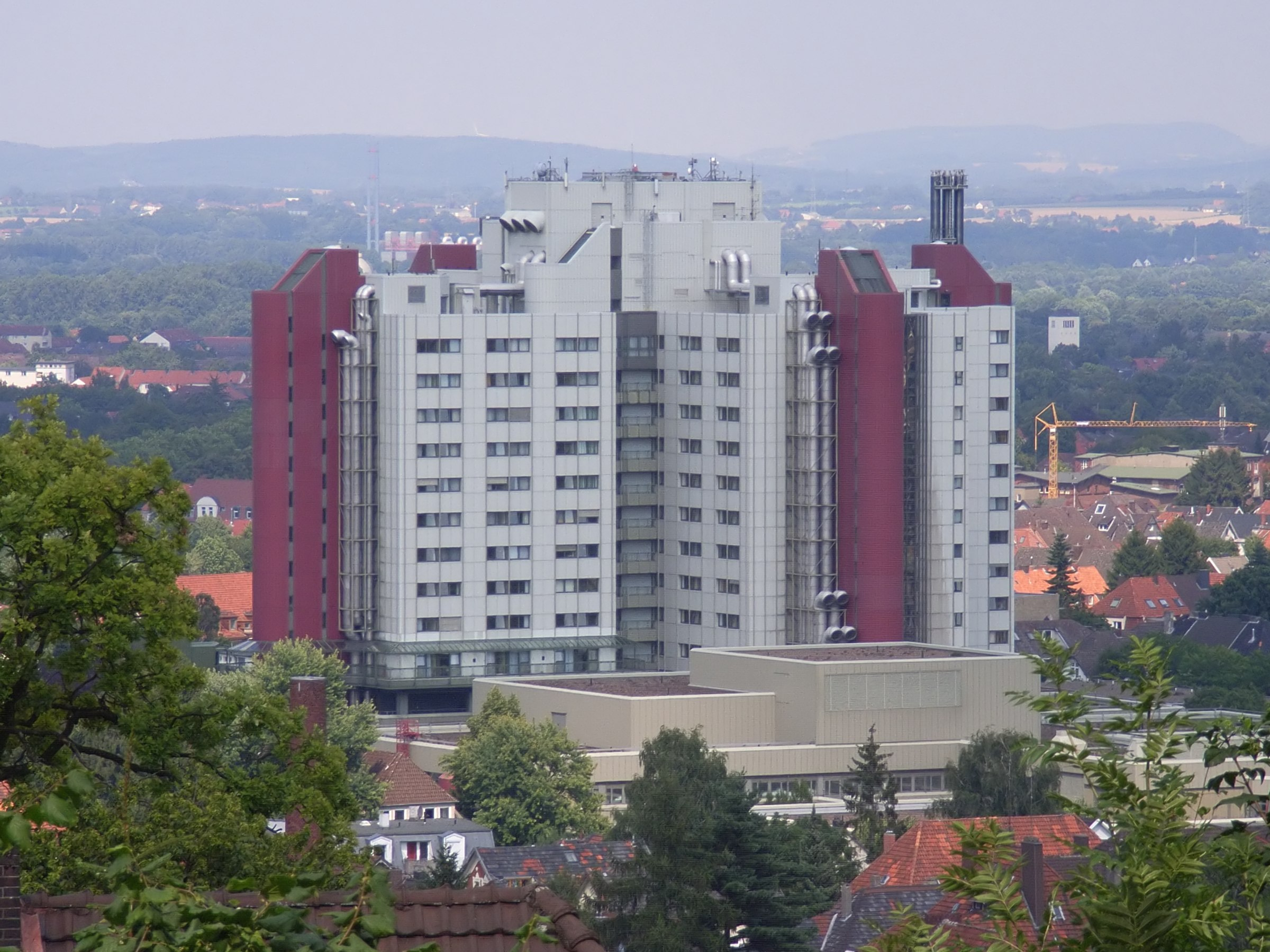 Bielefeld, Deutschland: Klinikum Mitte aus südwestlicher Richtung